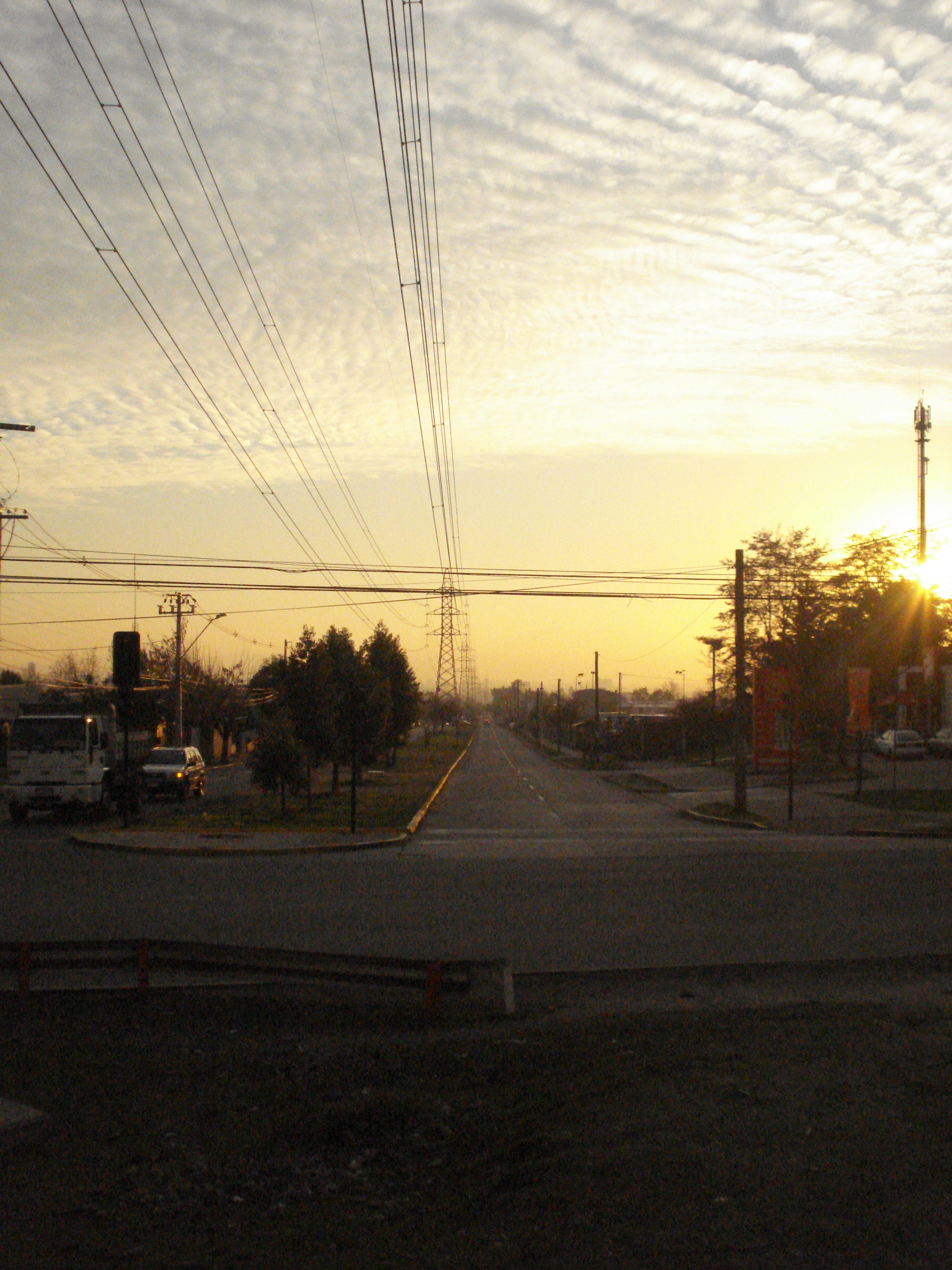 Avenida Las Torres con Tobalaba (Peñalolen)